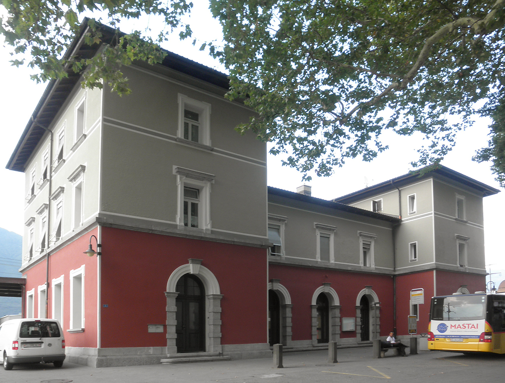 Stazione ferroviaria di Cadenazzo.